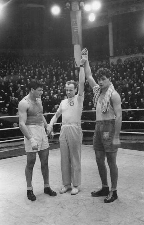 Farkas, Tadeus Grzelaks Zentralbild XIII 6.5.1952 Internationales Länderturnier der Amateurboxer in Moskau vom 7.-15.März 1952. Im Moskauer Staatlichen Zirkus fanden die internationalen Freundschaftswettkämpfe von Amateurboxern aus 7 Ländern statt. Im Ring trafen sich die Mannschaften der UdSSR, der CSR, Ungarn, Bulgarien, Polens, Rumäniens und der Deutschen Demokratischen Republik. Wettkämpfe der Ungarischen und Polnischen Mannschaften. UBz: Der Ringrichter erhebt die Hand Tadeus Grzelaks (Polen) dem Sieger über Farkas (Ungarn)